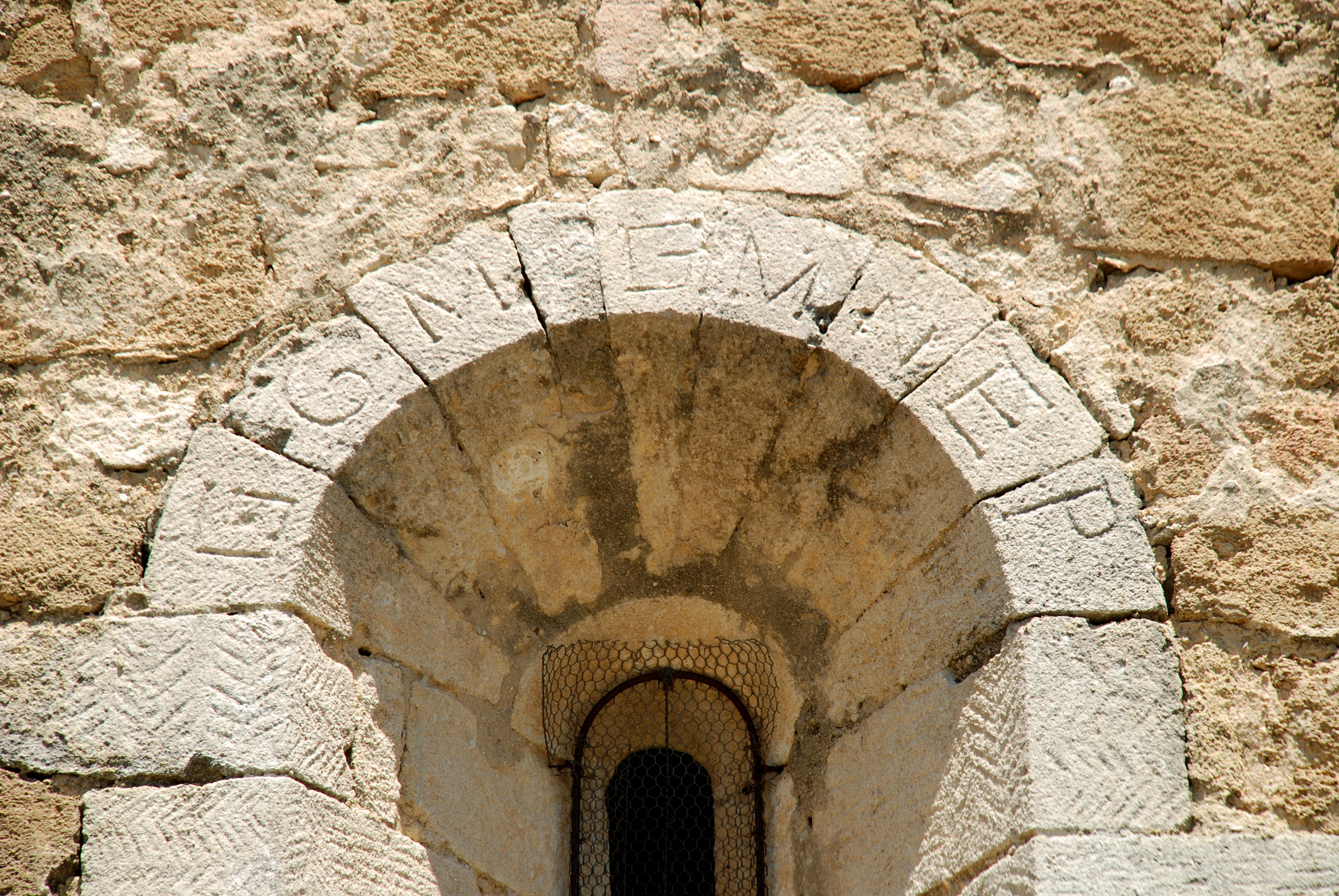 France - Église Saint-Pierre-ès-Liens de Colonzelle